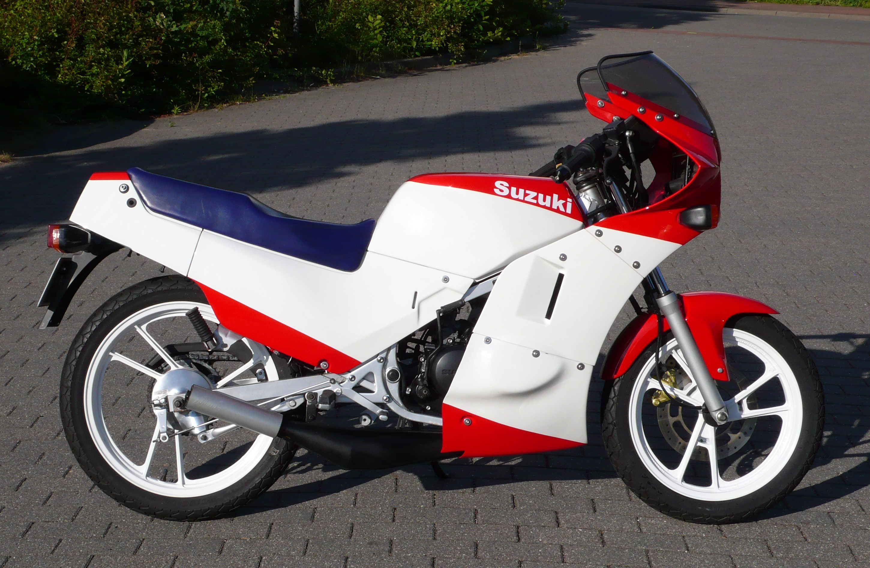 Suzuki RG 80 Gamma von Luca Neubauer